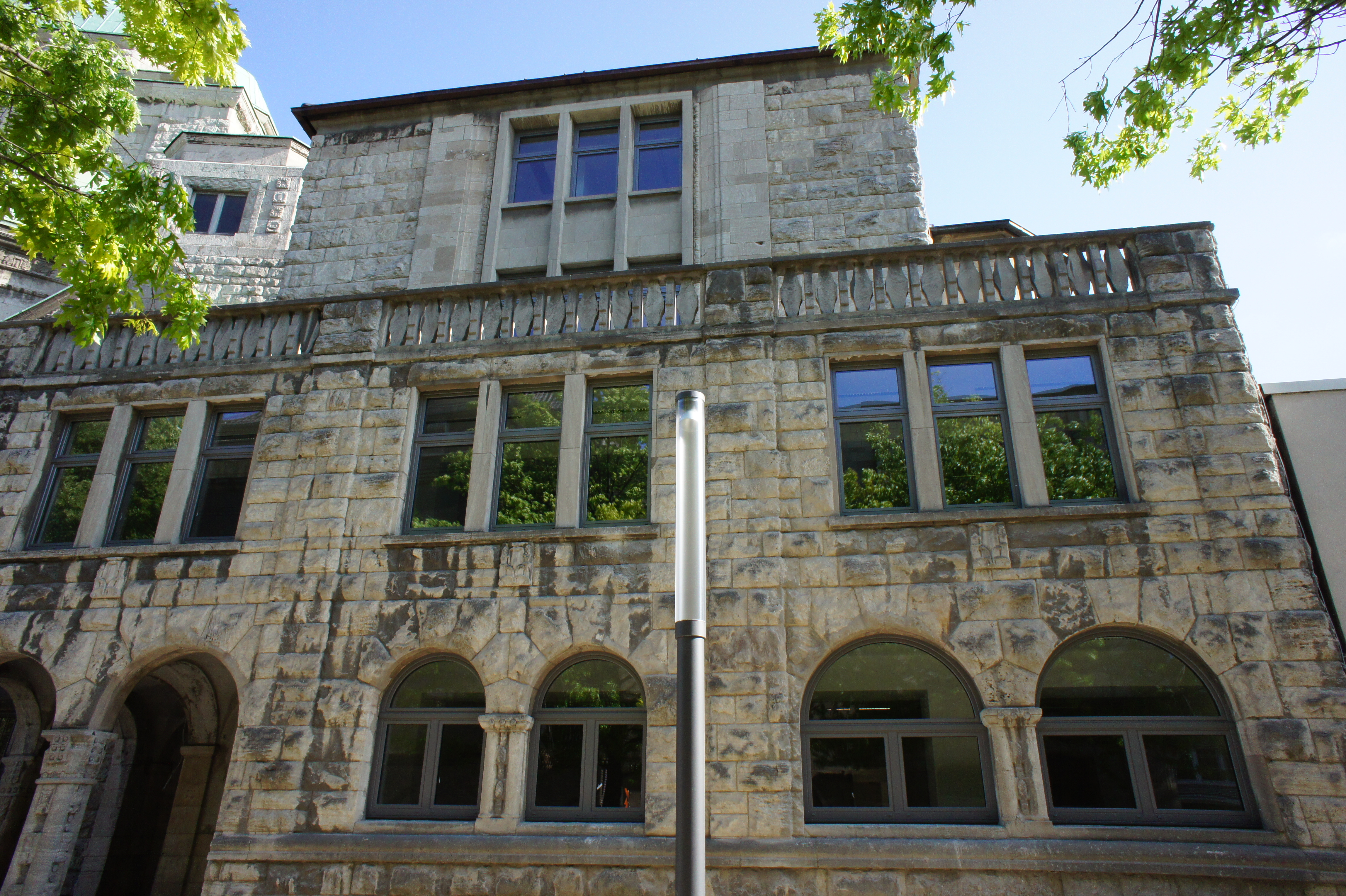 Ehemaliges Rabbinerhaus Essen. Sitz des Salomon Ludwig Steinheim-Instituts